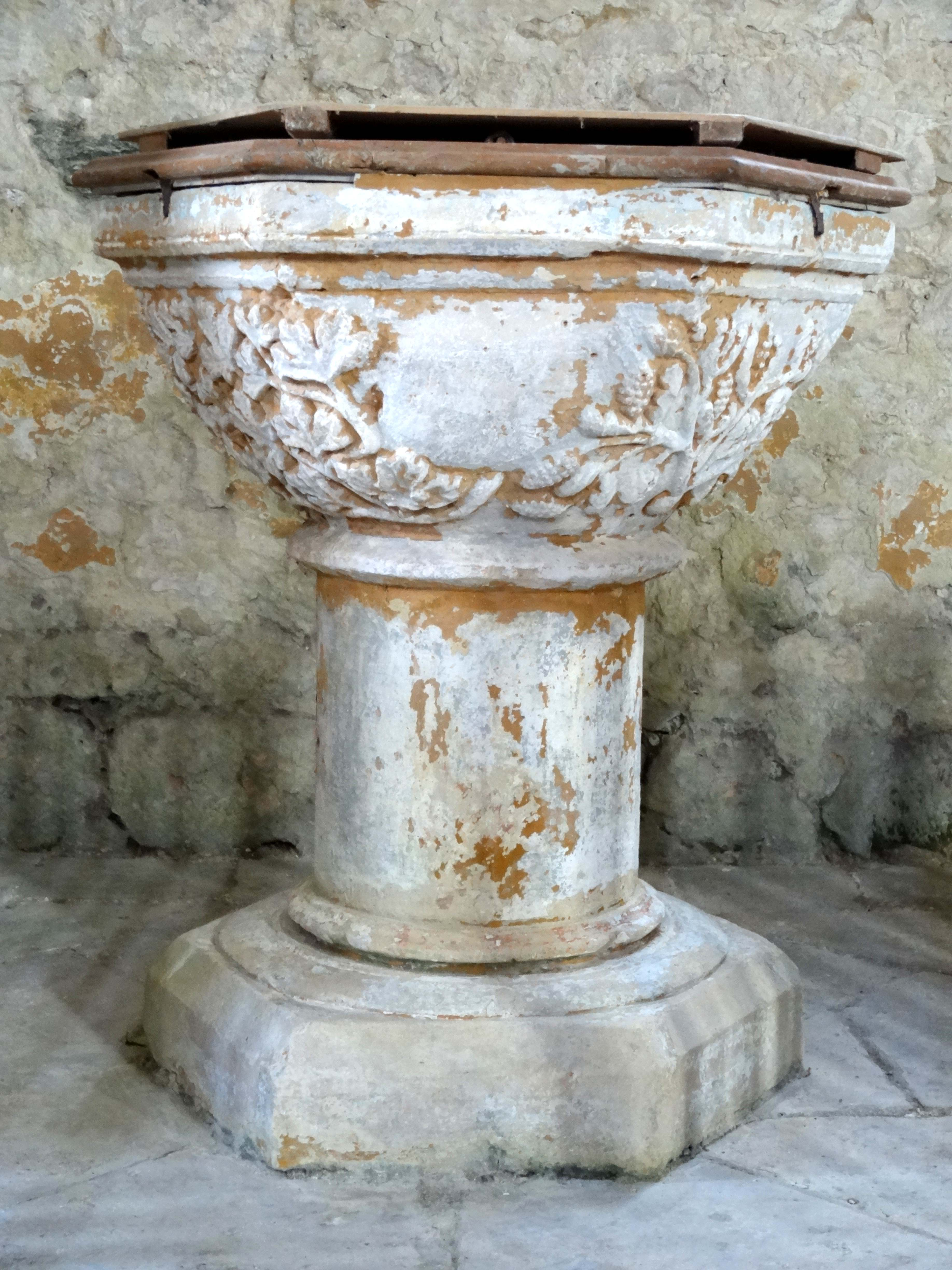 Mobilier de l'église - voir titre.